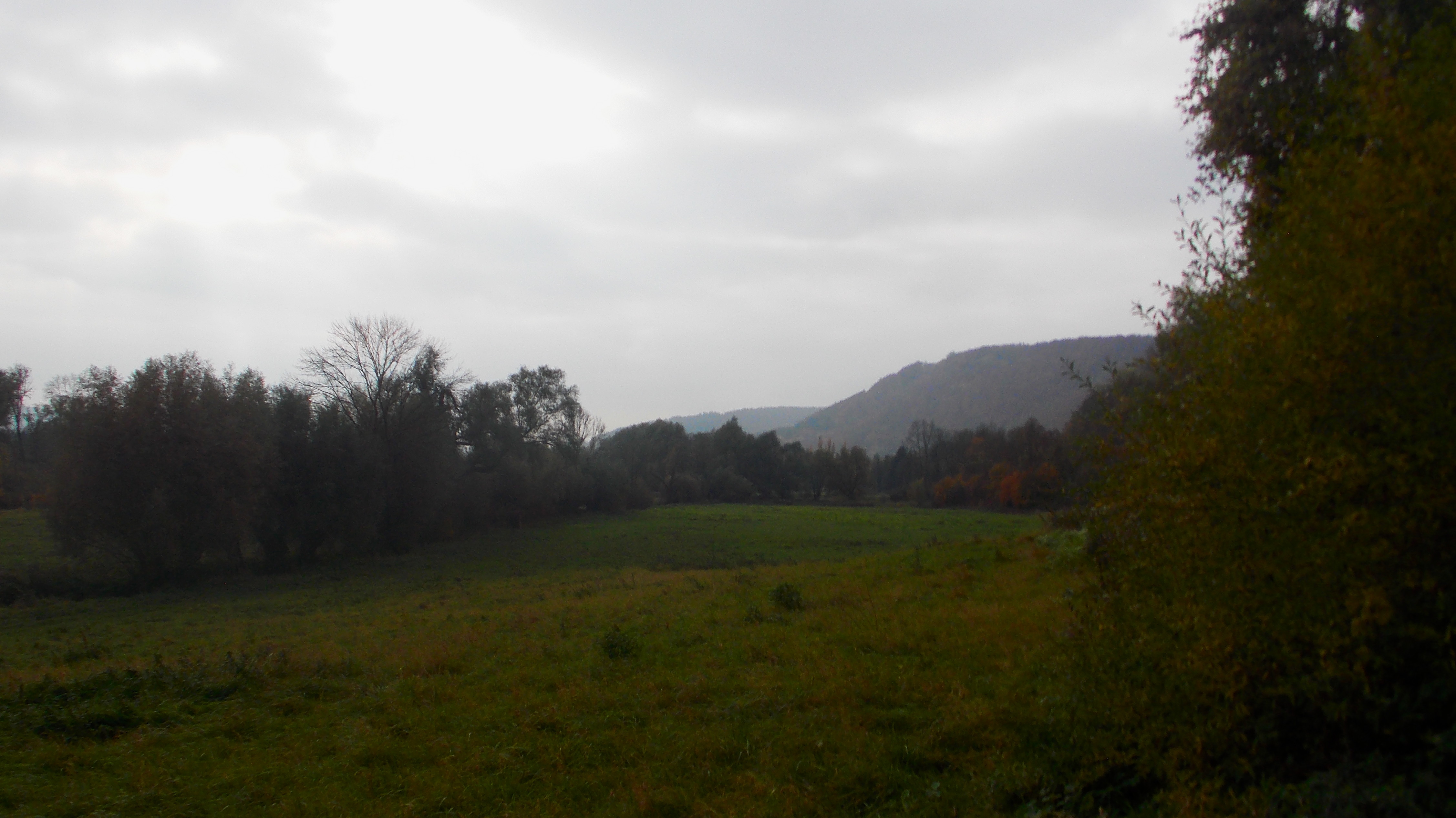 NSG Grundlose-Taubenborn, Kreis Höxter, Nordrhein-Westfalen